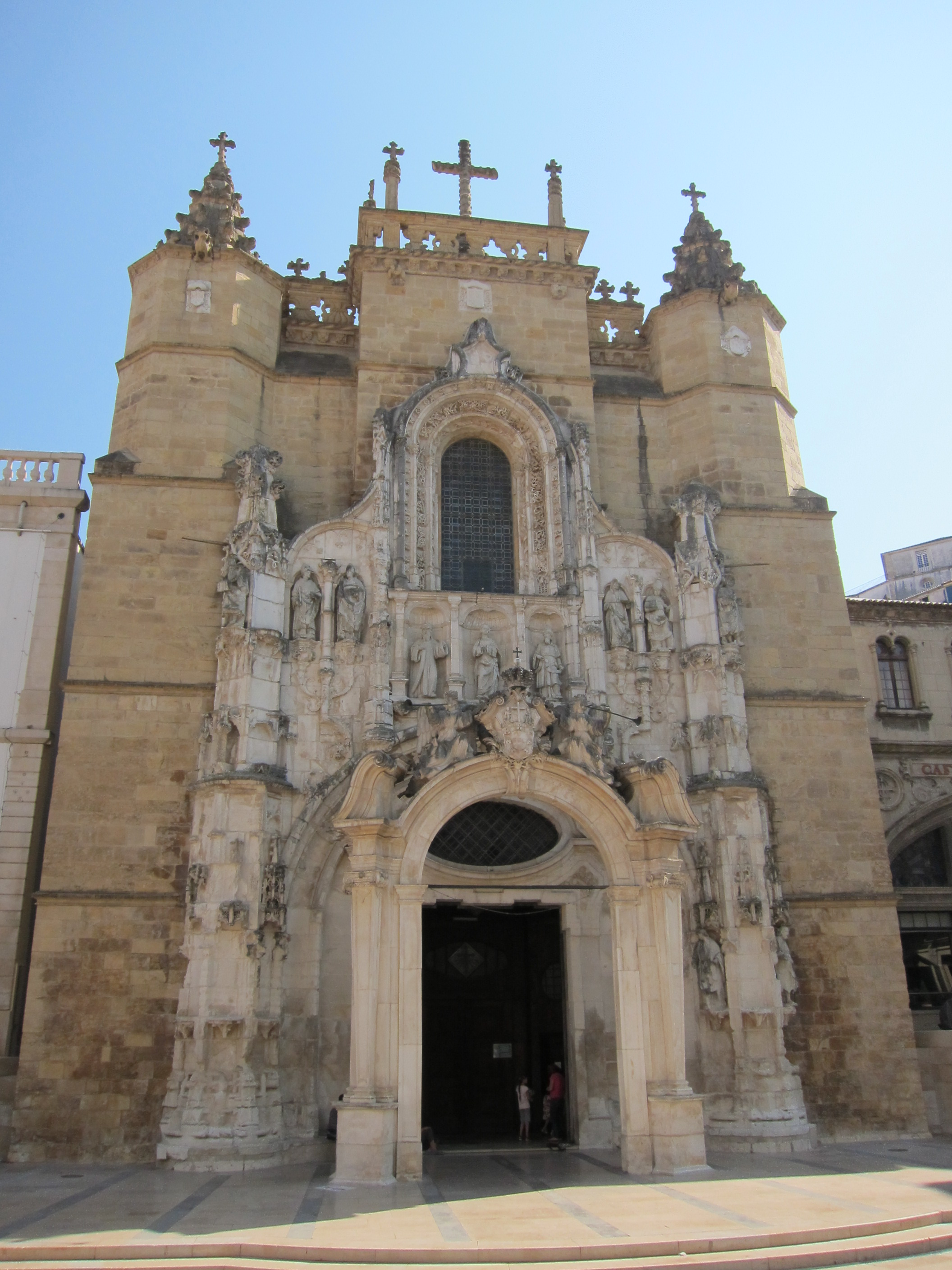 Igreja de Santa Cruz, Coimbra, Portugal